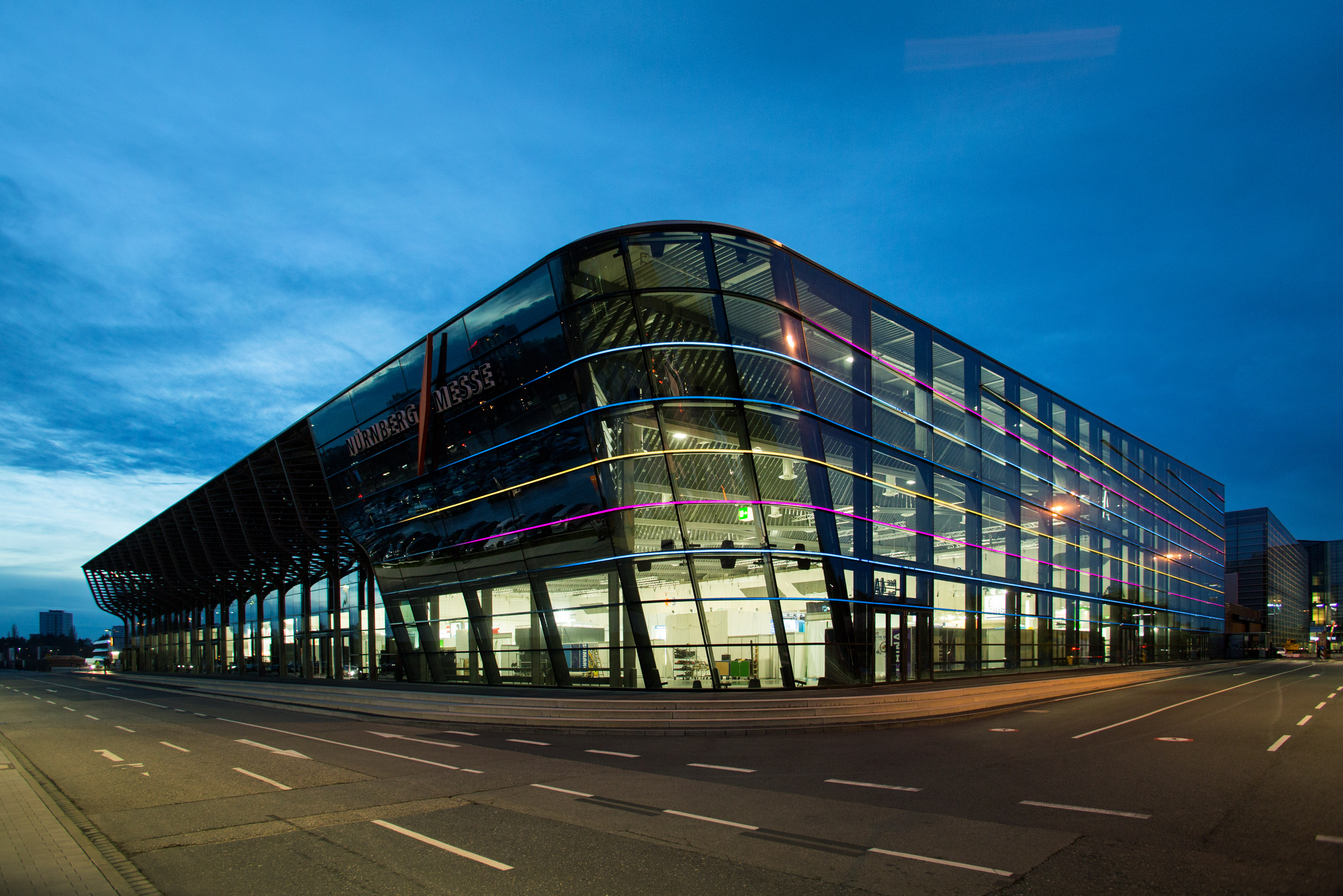 Auf dem Bild ist die Halle der Nürnberg Messe zu sehen